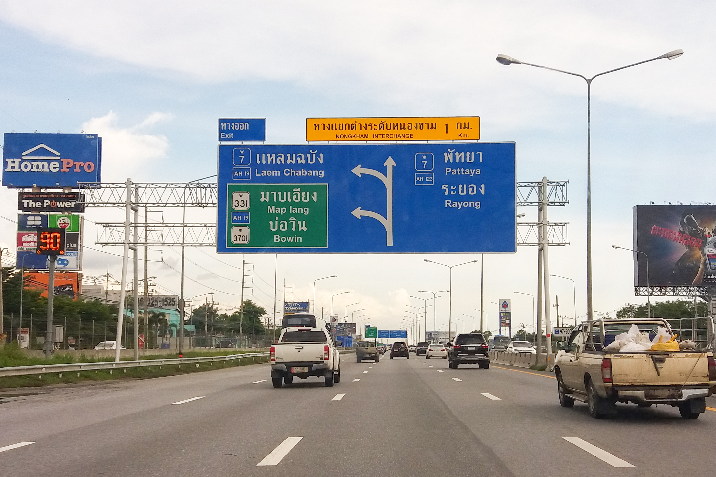 Head to Pattaya